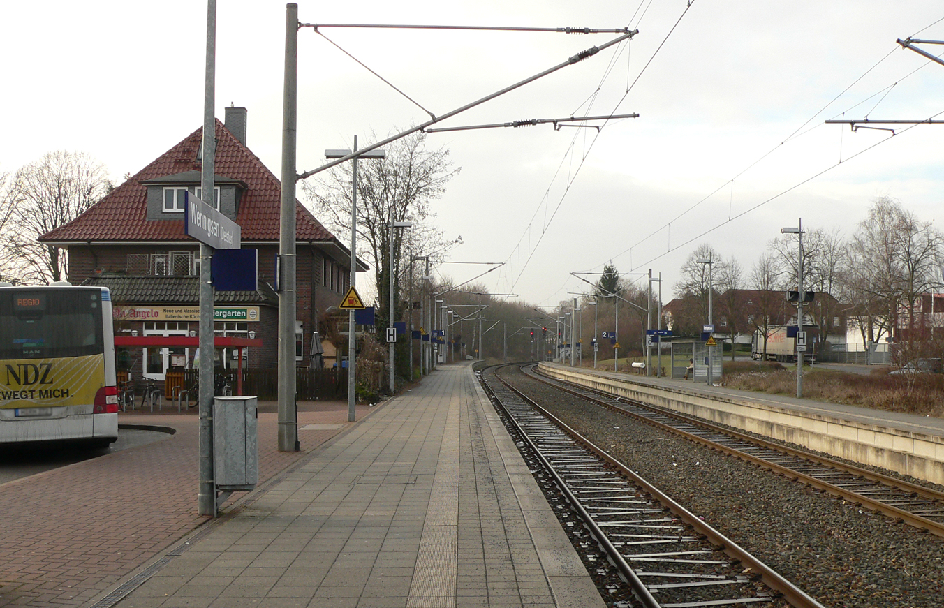 Bahnhof Wennigsen